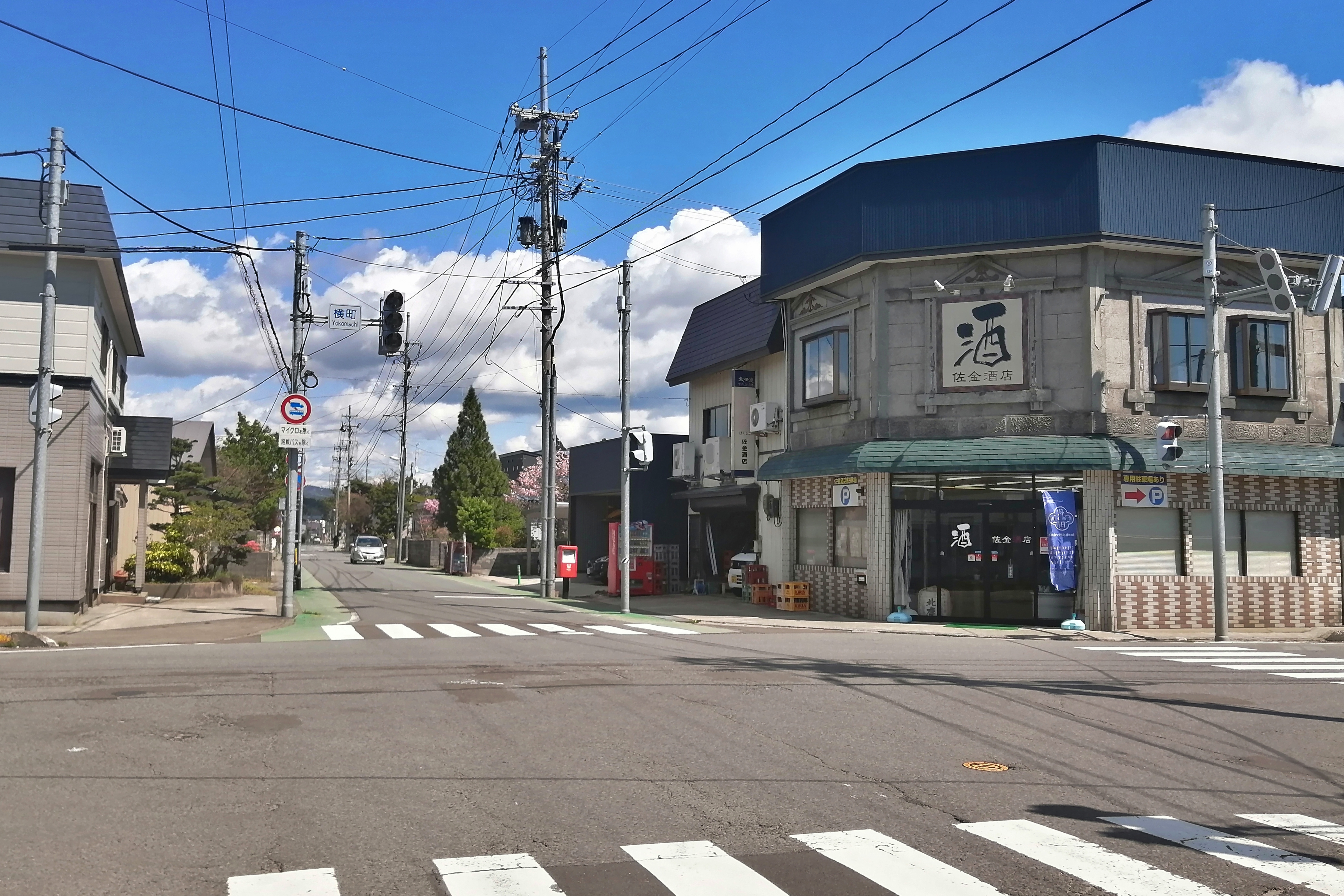 横町交差点（秋田県北秋田市）